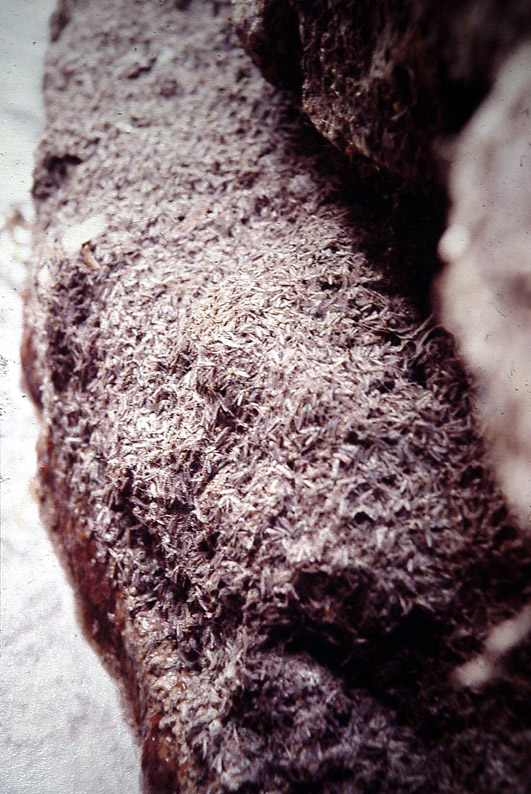 Sur une rangée de briques affleurant l'eau, sur la berge de l'Aa à Blendecques, accumulation de milliers d'exuvies de chironomes plumeux (une espèces de moustique qui ne pique pas, et dont la larve est l'un des seuls organismes à survivre dans les sédiments très chargés en matière organique en décomposition). Les larves en contribuant à aérer la vase contribuent au processus d'autoépuration et à la transparence de l'eau.